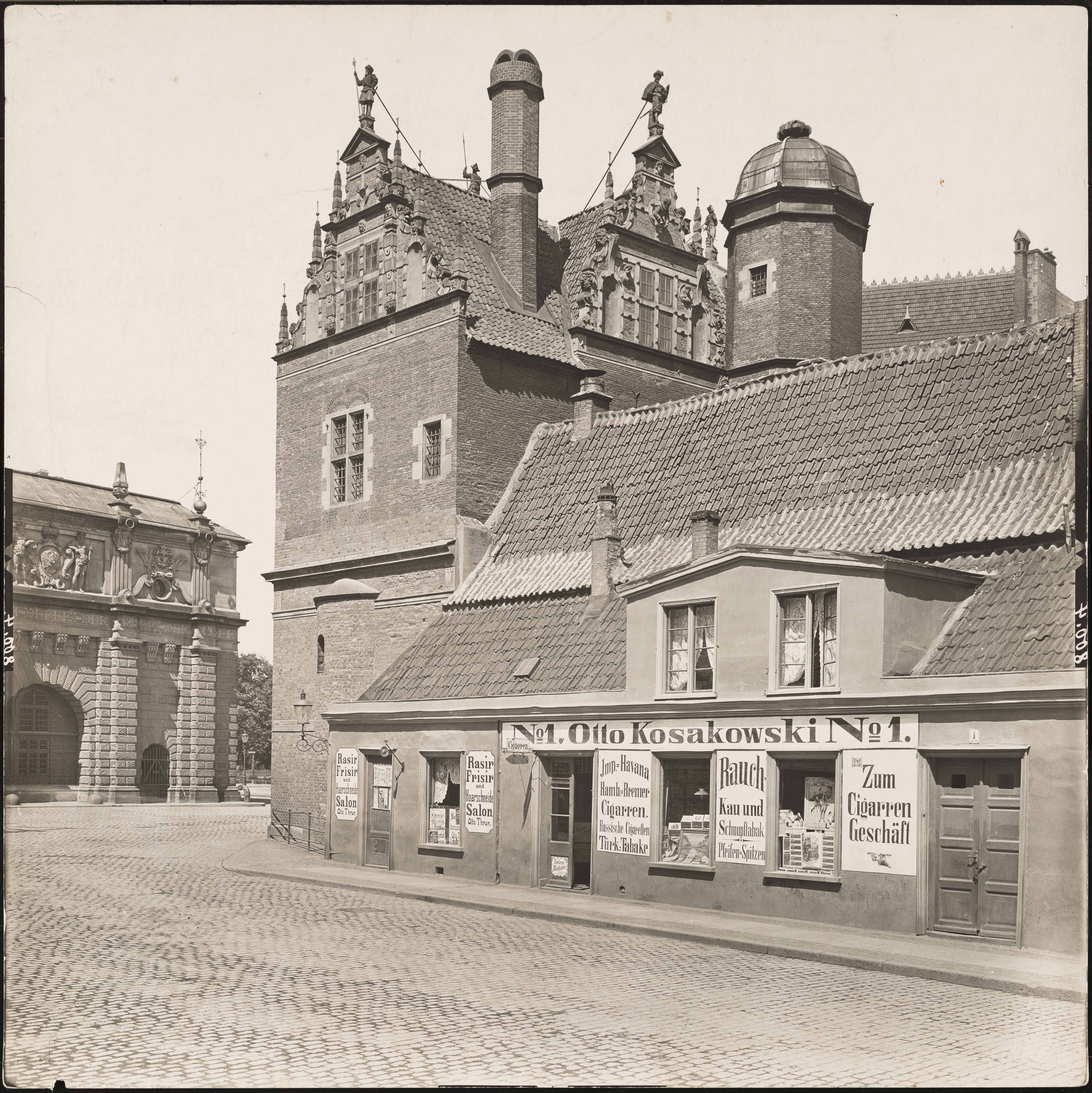 Widok na katownię oraz fragment Bramy Wyżynnej (z lewej strony). Na pierwszym planie nieistniejący dziś budynek przylegający bokiem do Zespołu Przedbramia. Na budynku szyldy w języku niemieckim informujące o tym, że znajdował się tam salon fryzjerski Otto Thurna oraz sklep z tytoniem Otto Kosakowskiego. Widoczna jest również rzeźba klucznika pod naczółkiem Katowni która wbrew intencji autora rzeźby Willema van der Meera posiada głowę.